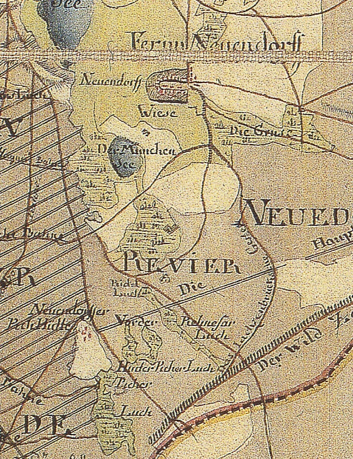 Karte von Fernneuendorf (Ortsteil Sperenberg der Gem. Am Mellensee, Brandenburg, Deutschland), aus den Jahren 1767 bis 1787, Land Brandenburg, Deutschland